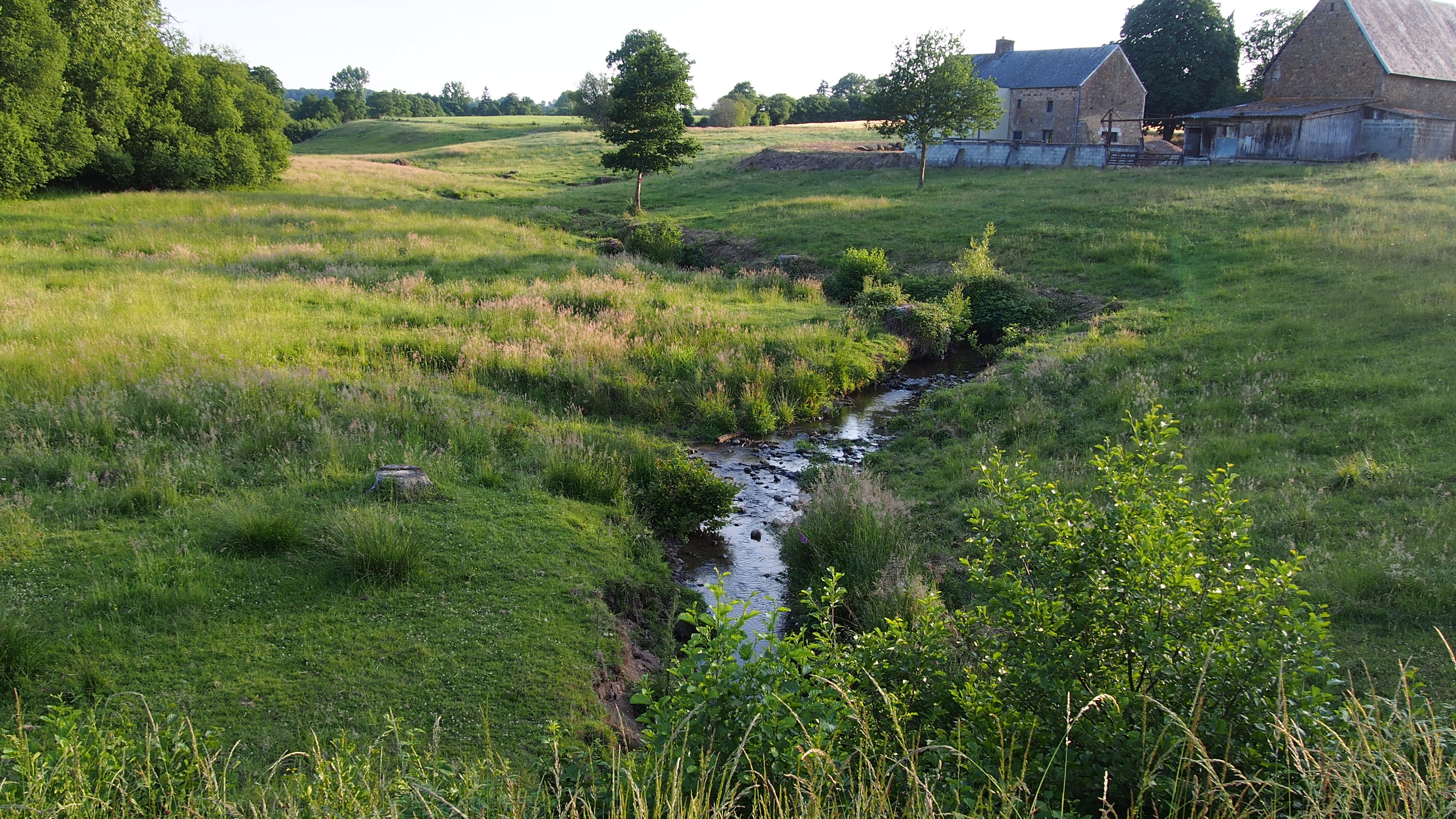 Le Lembron entre Ronfeugerai, à gauche, et Athis-de-l'Orne, à droite (Normandie, France).